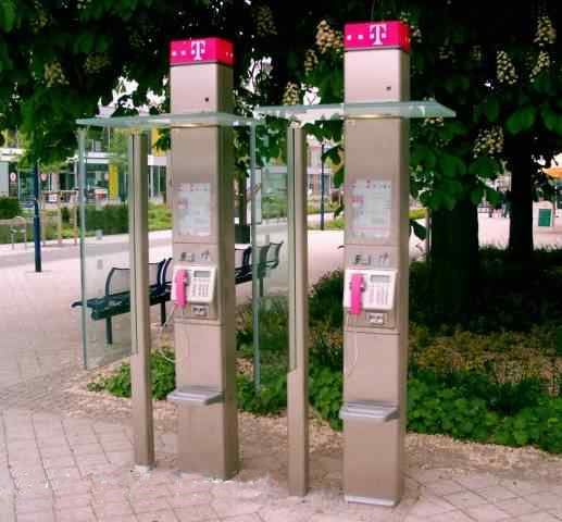 Telestation Langversion, zwei